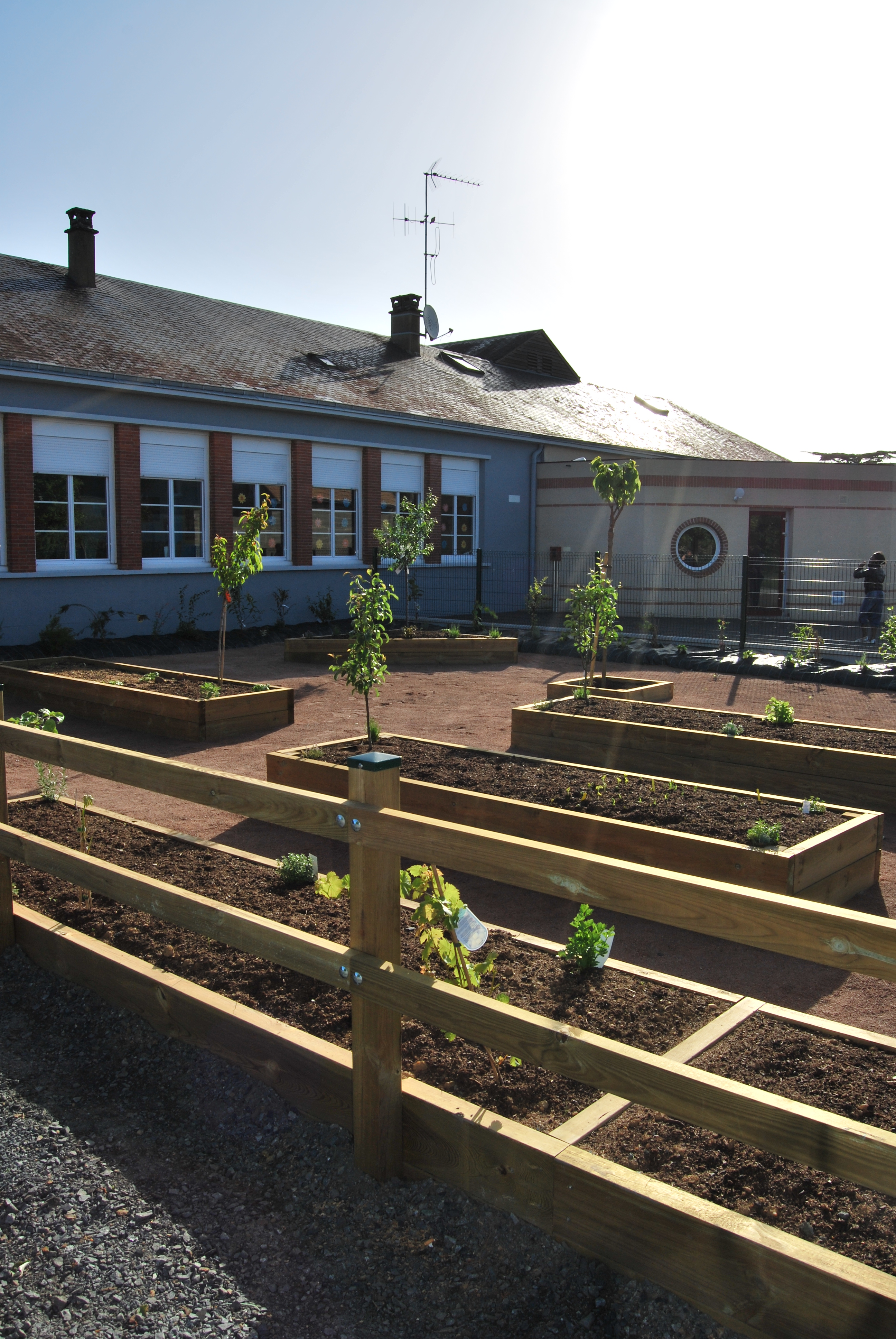 Jardin pédagogique de l'école de Saint-Georges-du-Bois dans le département français de la Sarthe, en mai 2009. Lauréat du trophée du grand prix du développement durable de la Sarthe.